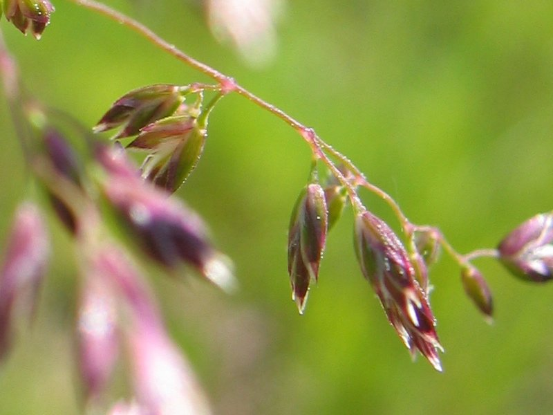 Wiesen-Rispengras Poa pratensis, Stoltera Nähe Rostock